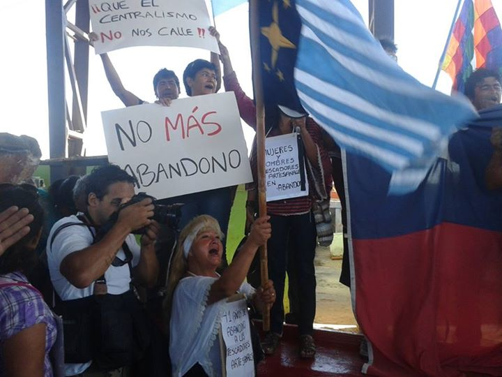 Mujer sosteniendo la bandera regionalista.